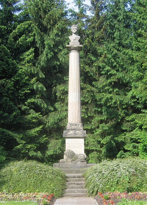 Ottosäule in Ottobrunn